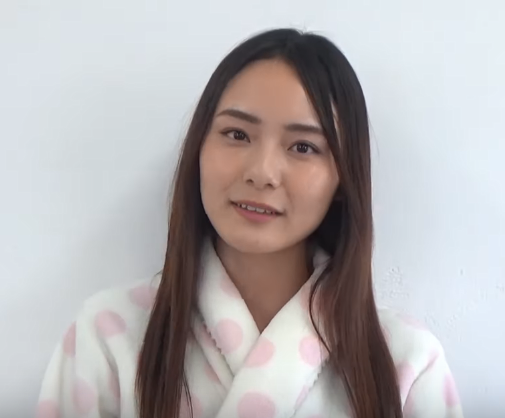 池松愛理です。